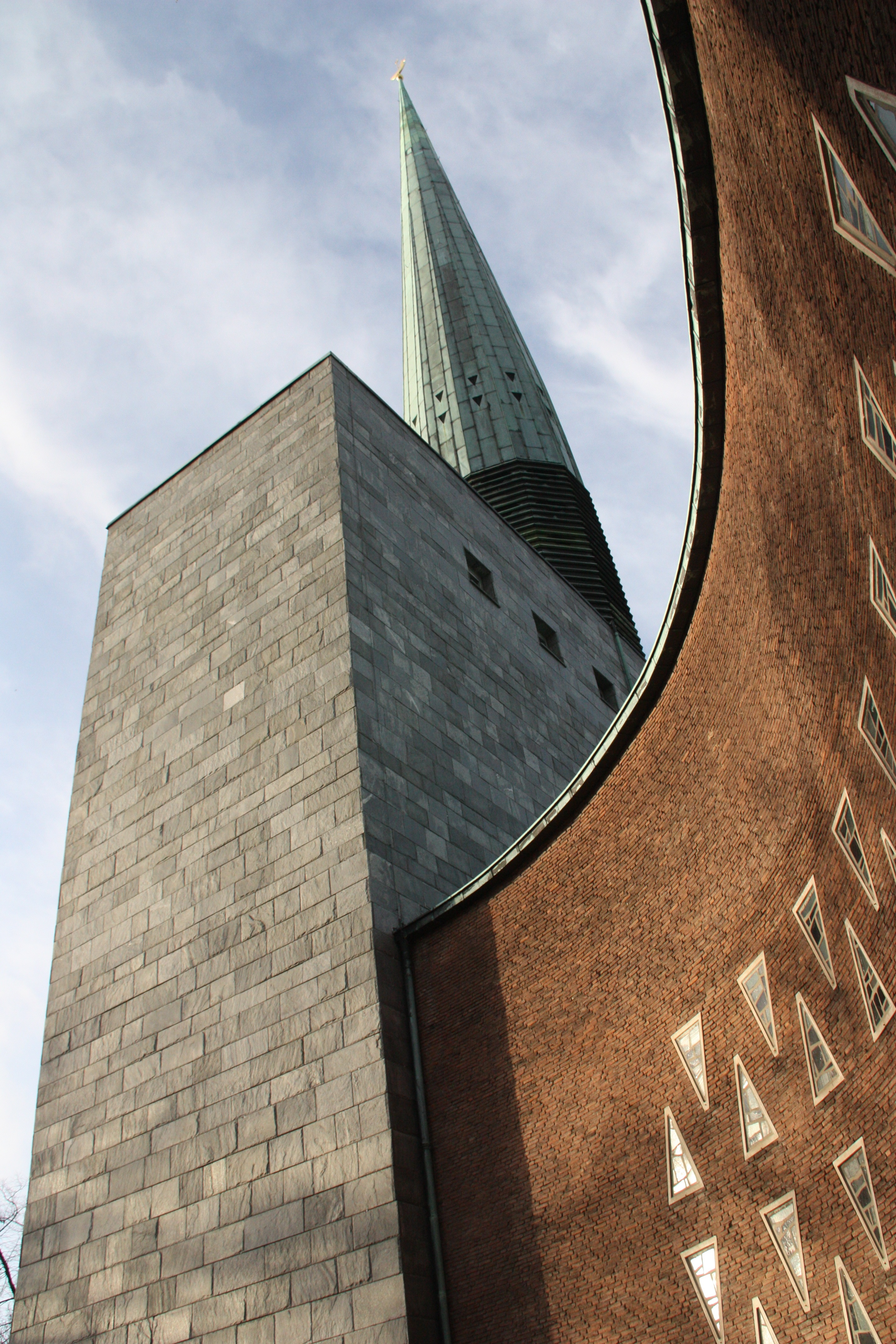 Hamburg, Neue Sankt Nikolai-Kirche, Harvestehude, Blick auf Kirchenschiff und Turm